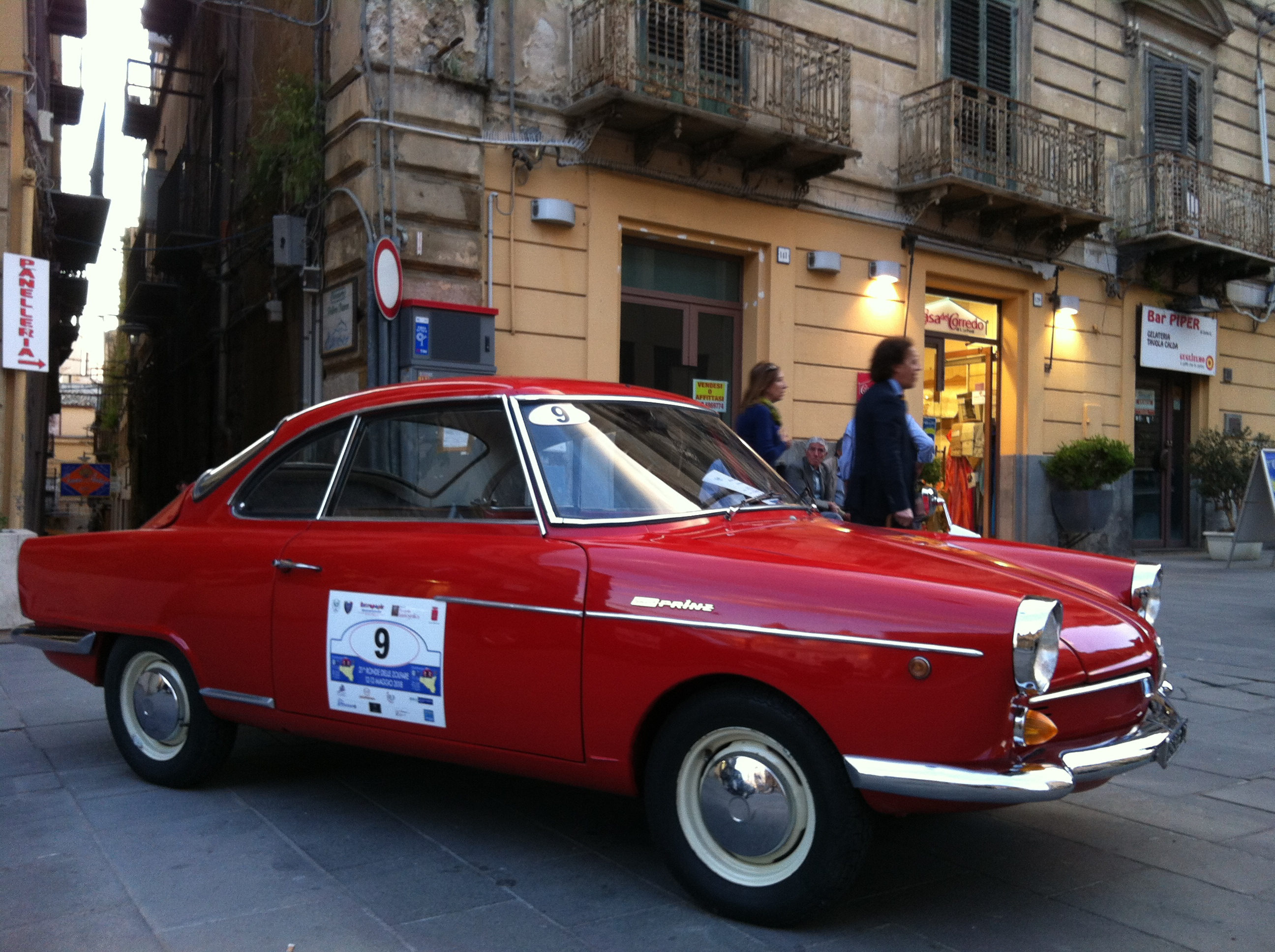 Auto storica: NSU Sportprinz